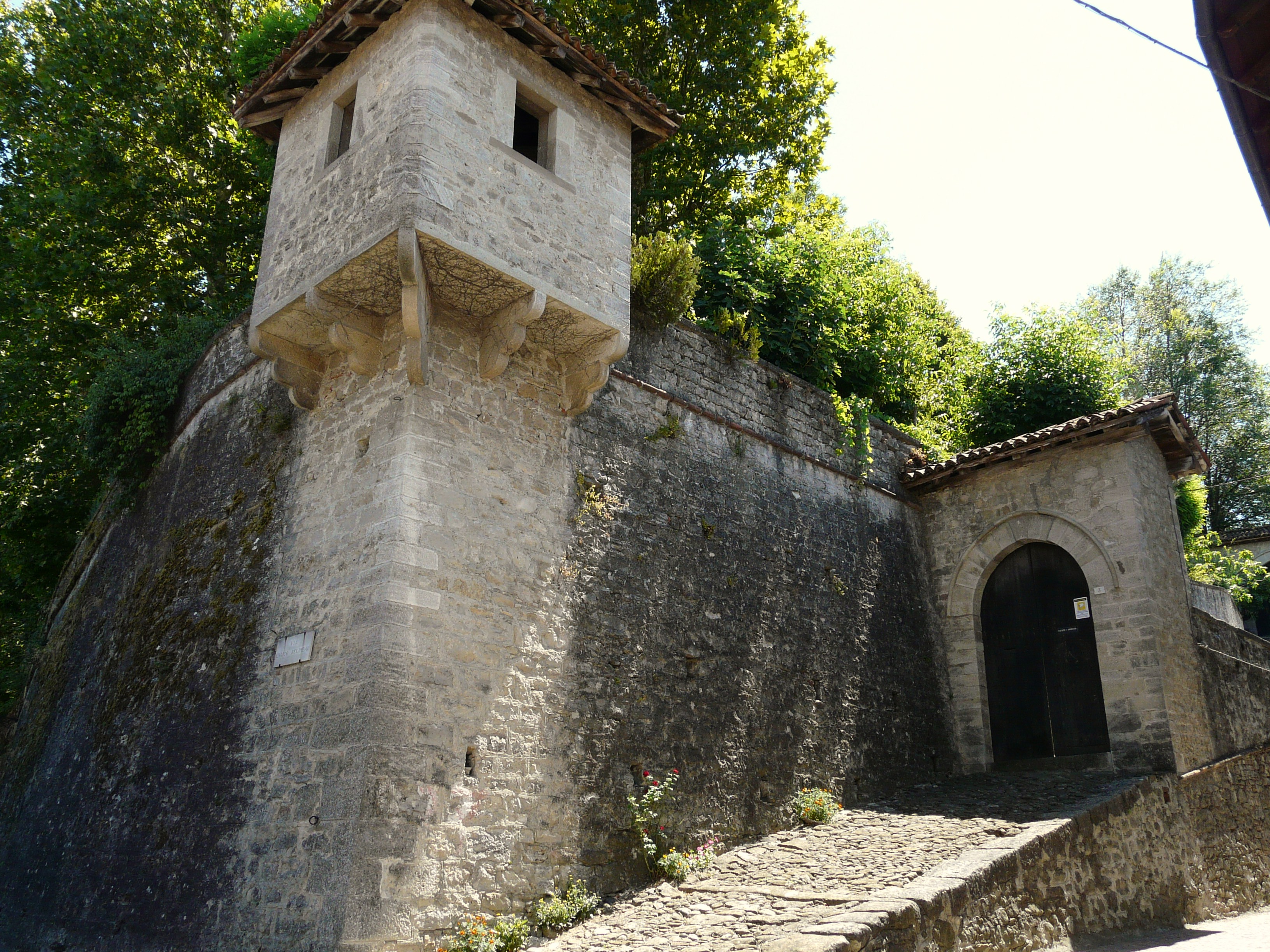 Torretta del castello di Castelletto d'Orba, Piemonte, Italia